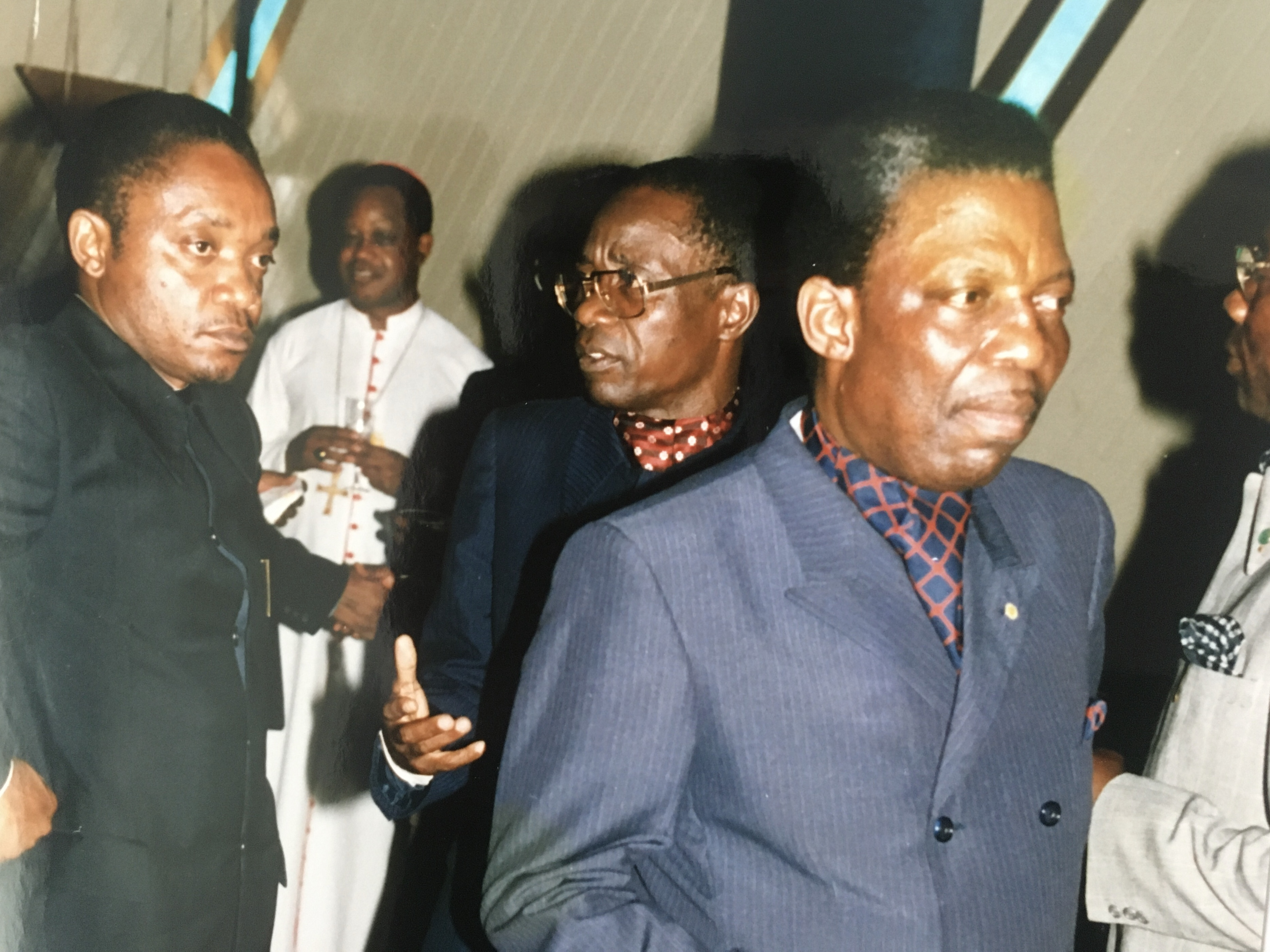 Pierre Pay-Pay en 1987